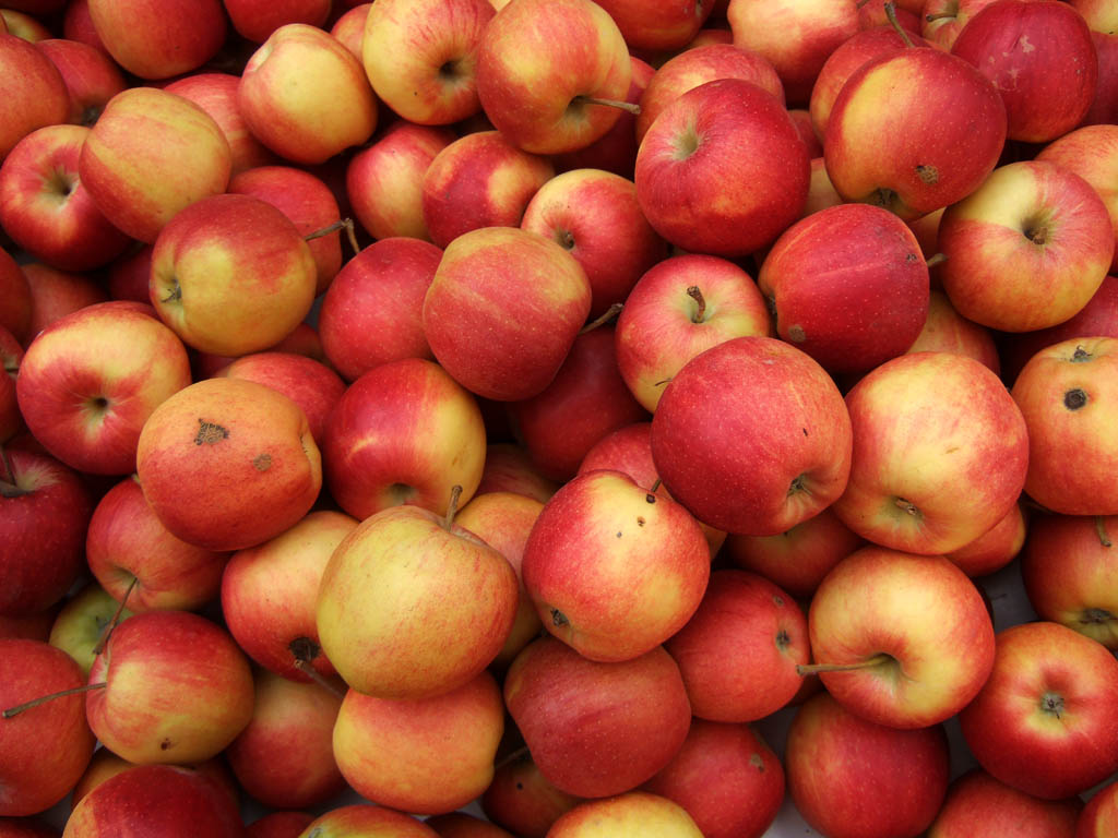 Gala